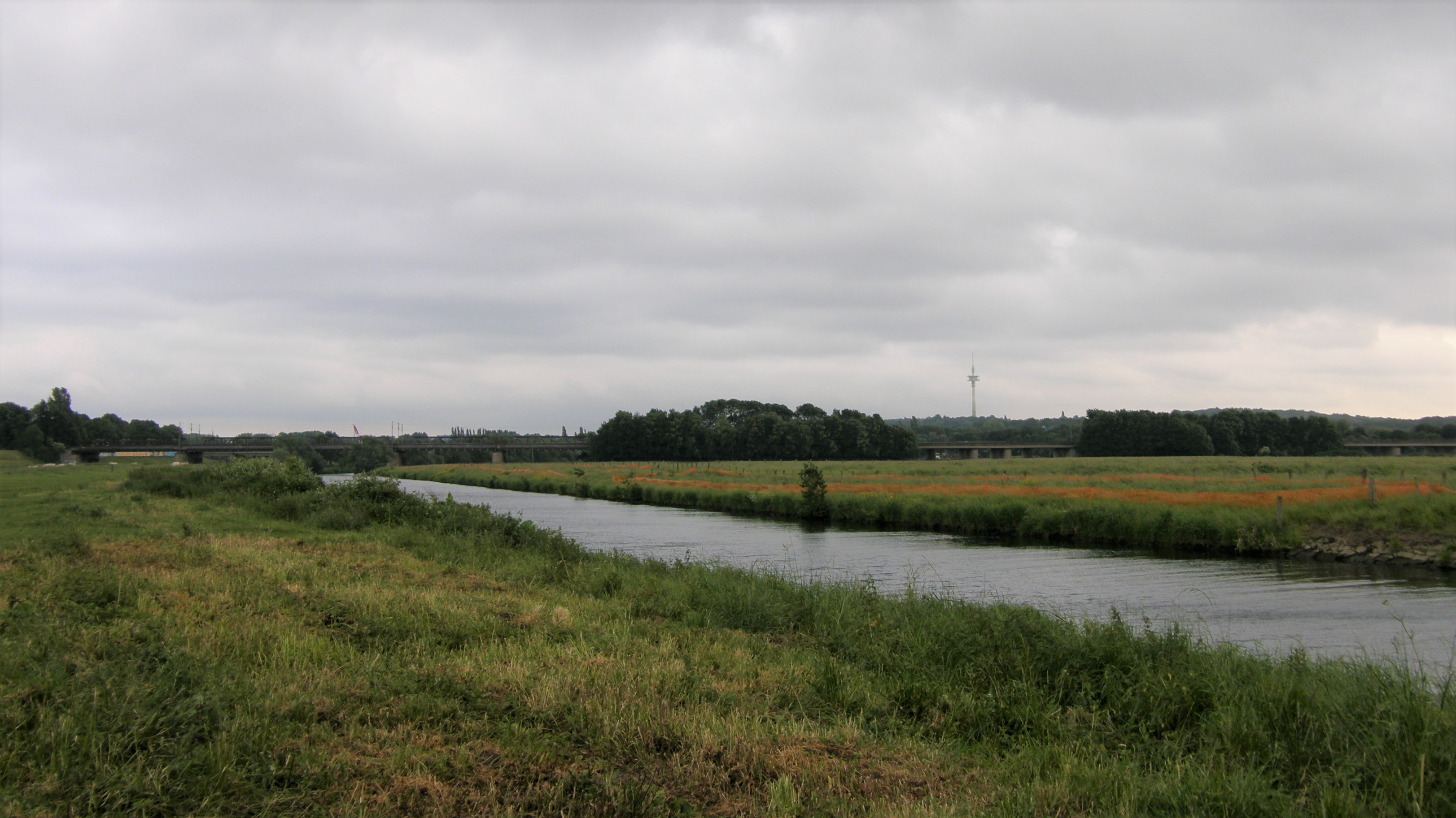 Ruhraue Ruhr mit Auenwiesen